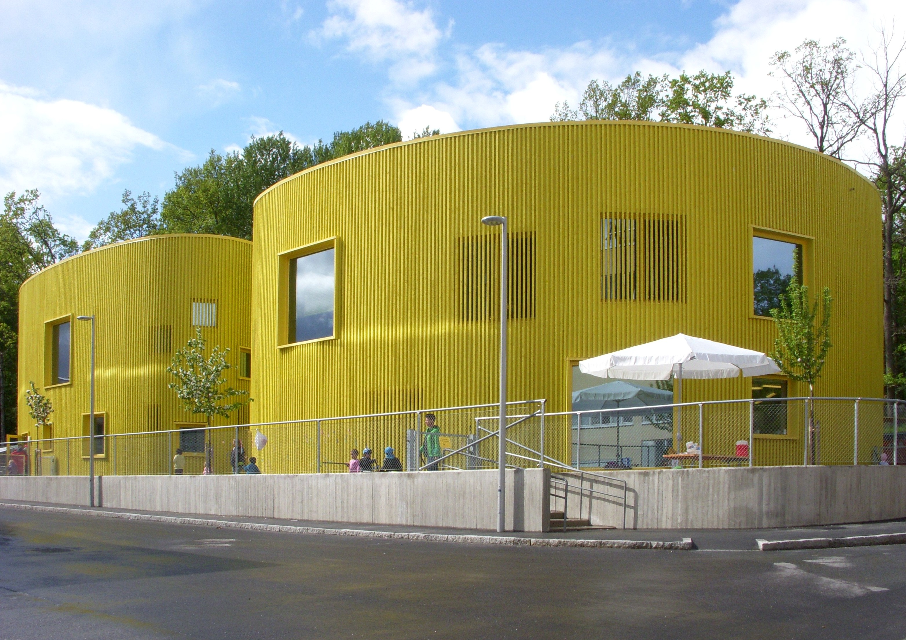 Förskolan i kvarteret "Paletten", nominerad till "Årets Stockholmsbyggnad 2011", arkitekt: Tham & Videgård Arkitekter